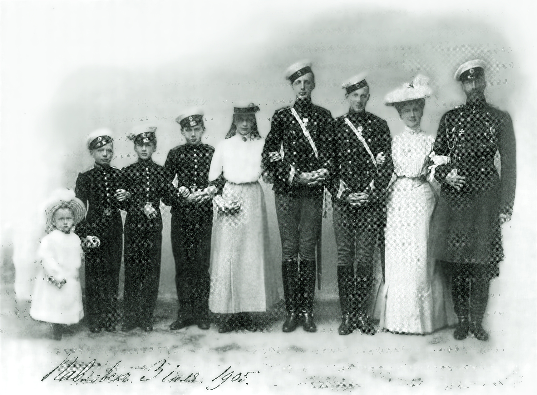 Семья Константина Романова (Константиновичи).Фото К.Ягельского